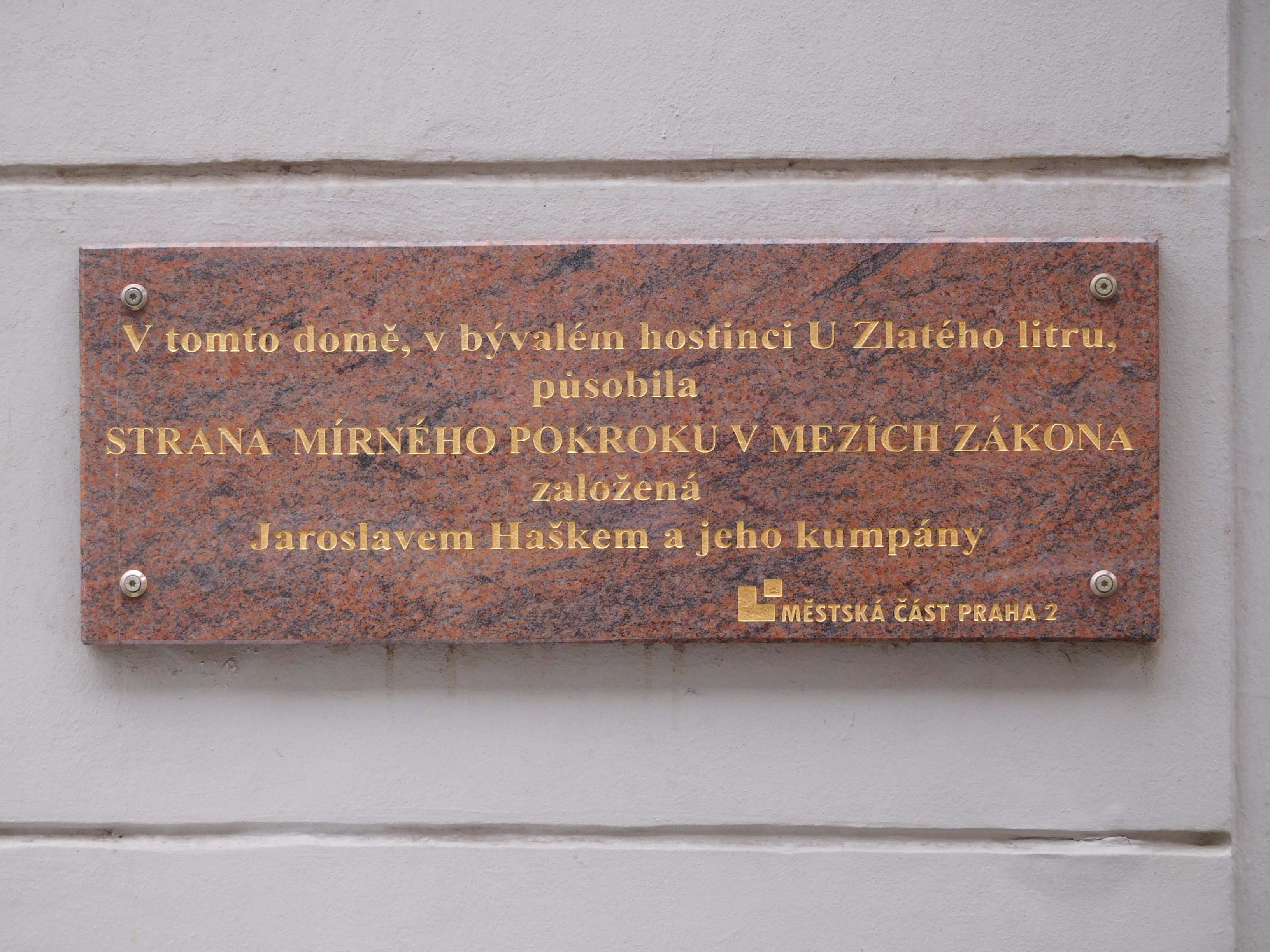 Praha - Vinohrady, Balbínova 6 - pamětní deska Strany mírného pokroku v mezích zákona